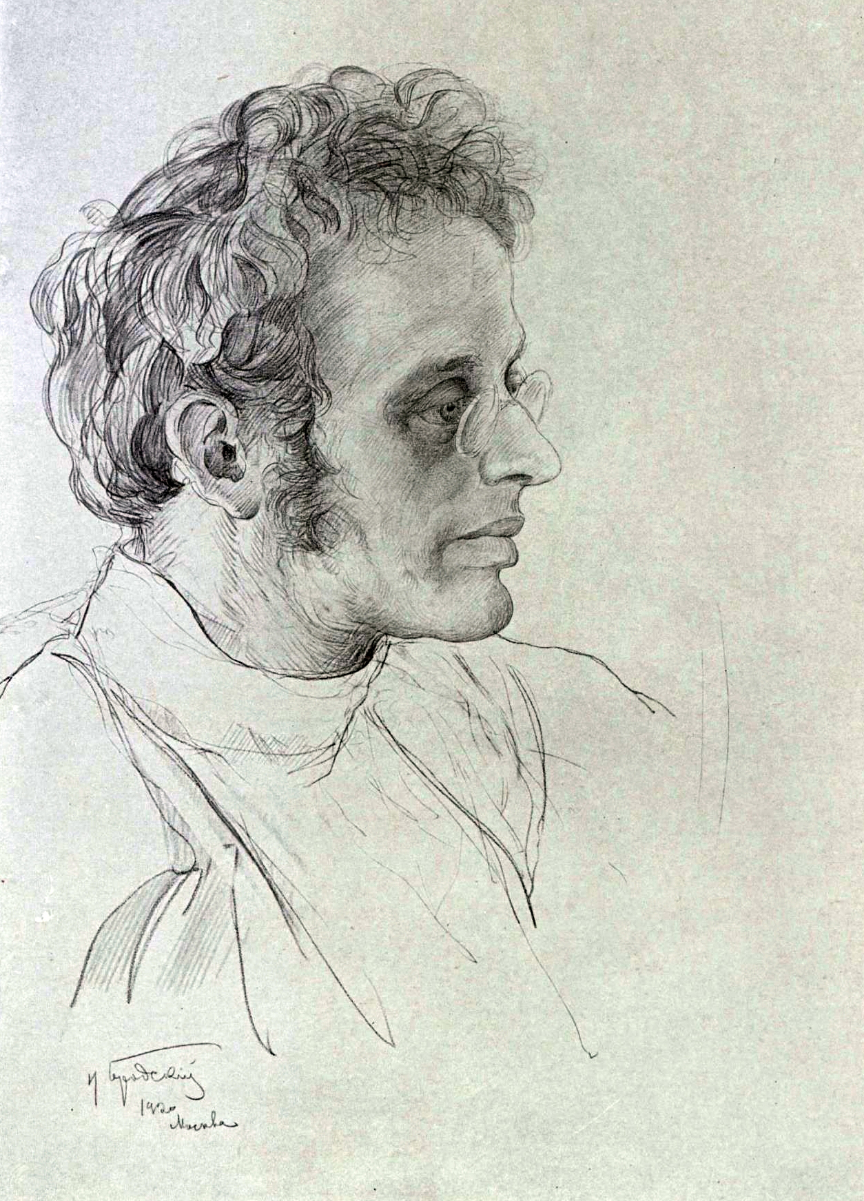 Радек, Карл Бернгардович